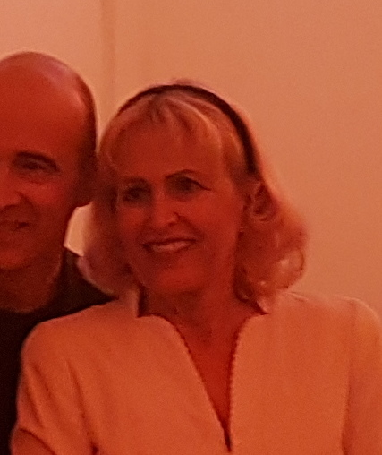 Francesco Giorgino, Lorenzo Marone, Cinzia Tani, al Premio Candelaio presso il Seminario vescovile di Nola, 4 maggio 2018